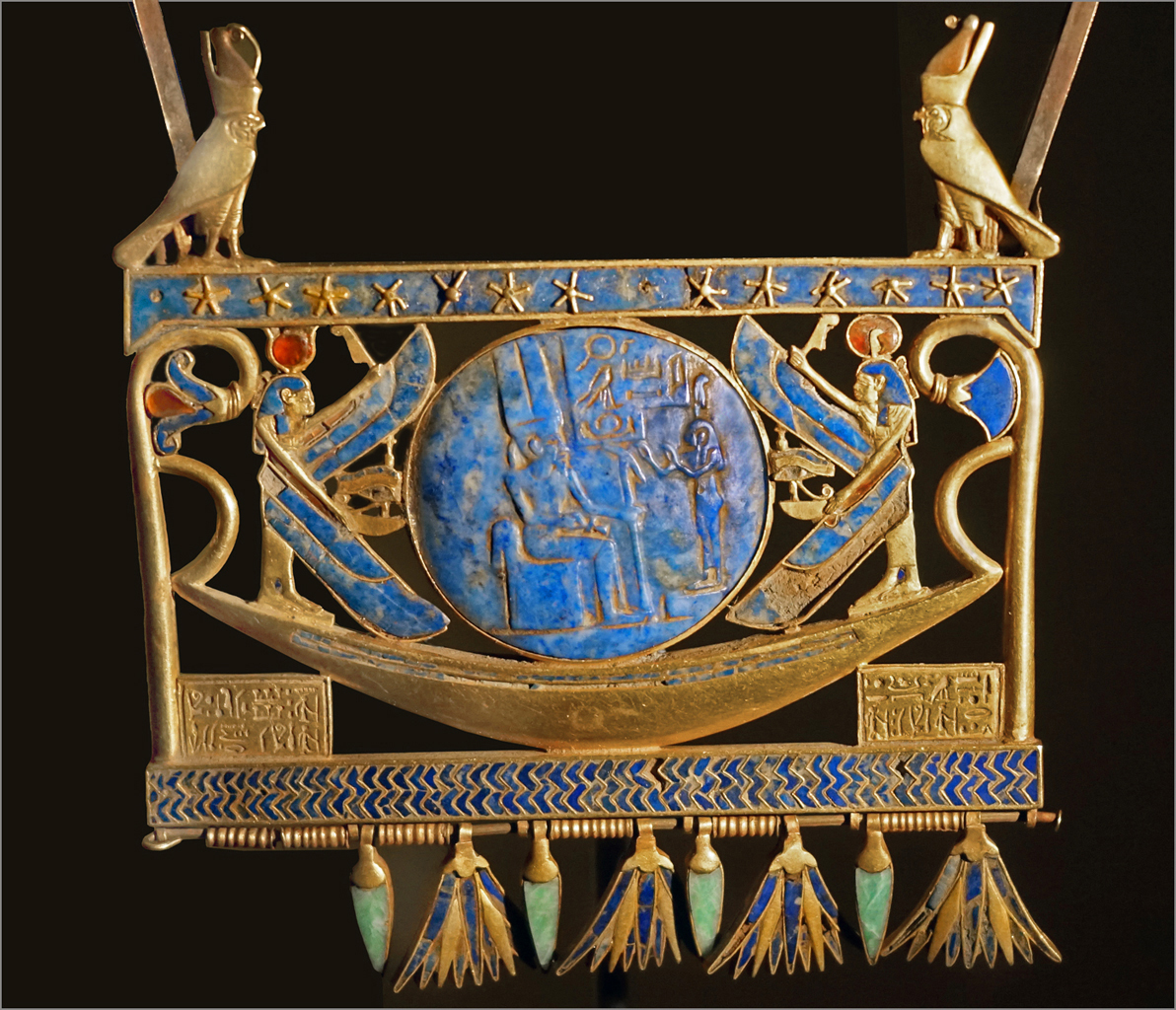 Náprsník s motivem sluneční bárky personifikován Šešonke I. a jeho syn Nimlot; 22. dynastie